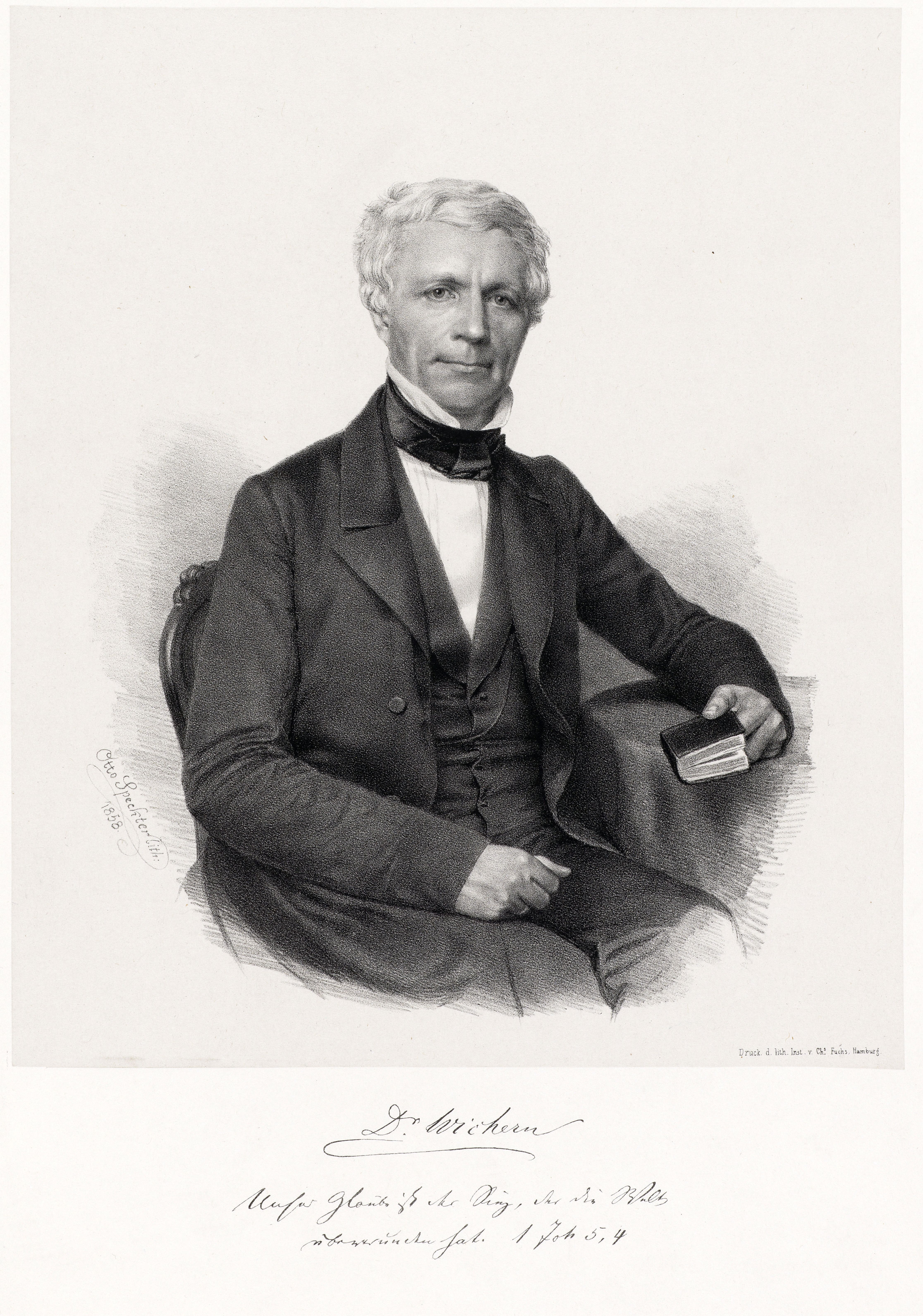 Bildnis von Johann Heinrich Wichern